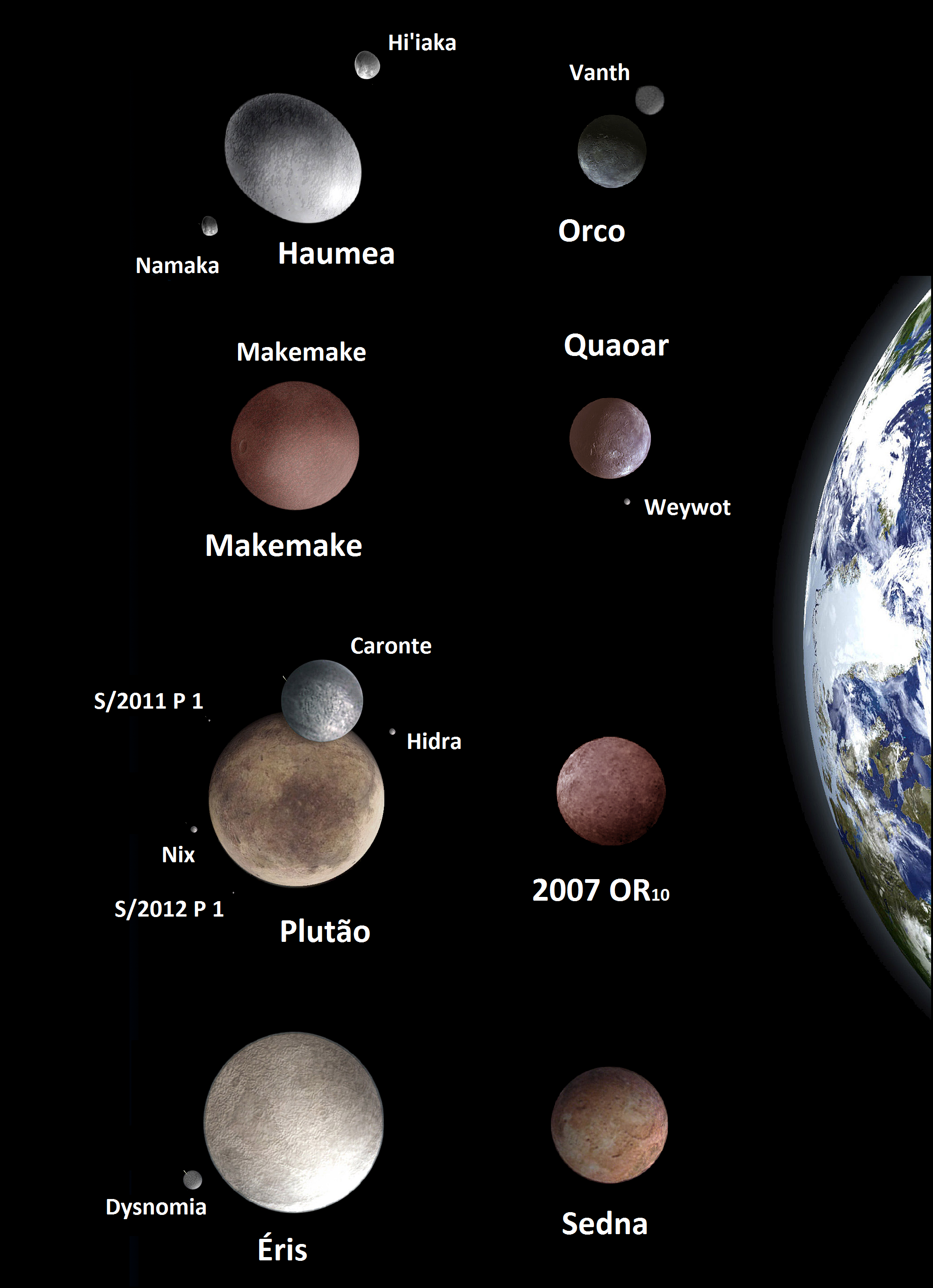 Oito dos maiores objetos transnetunianos com a Terra, sendo que quatro deles são planetas anões.